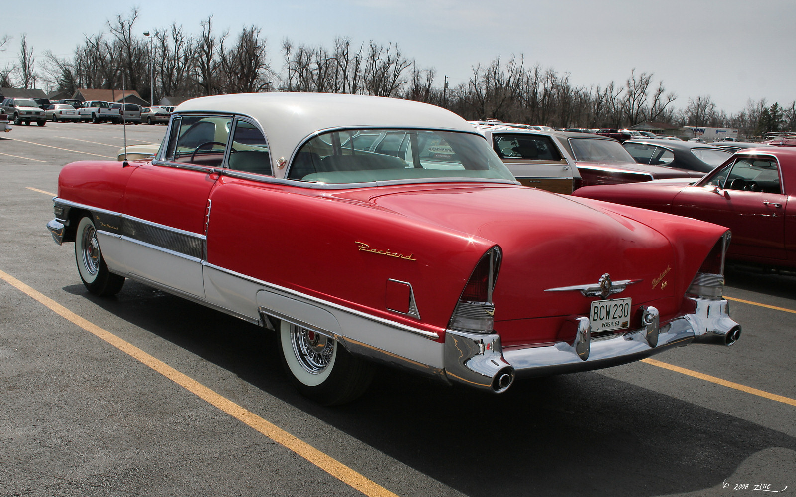 '57 Heaven Museum & Branson/Springfield, MO, March 20, 2008